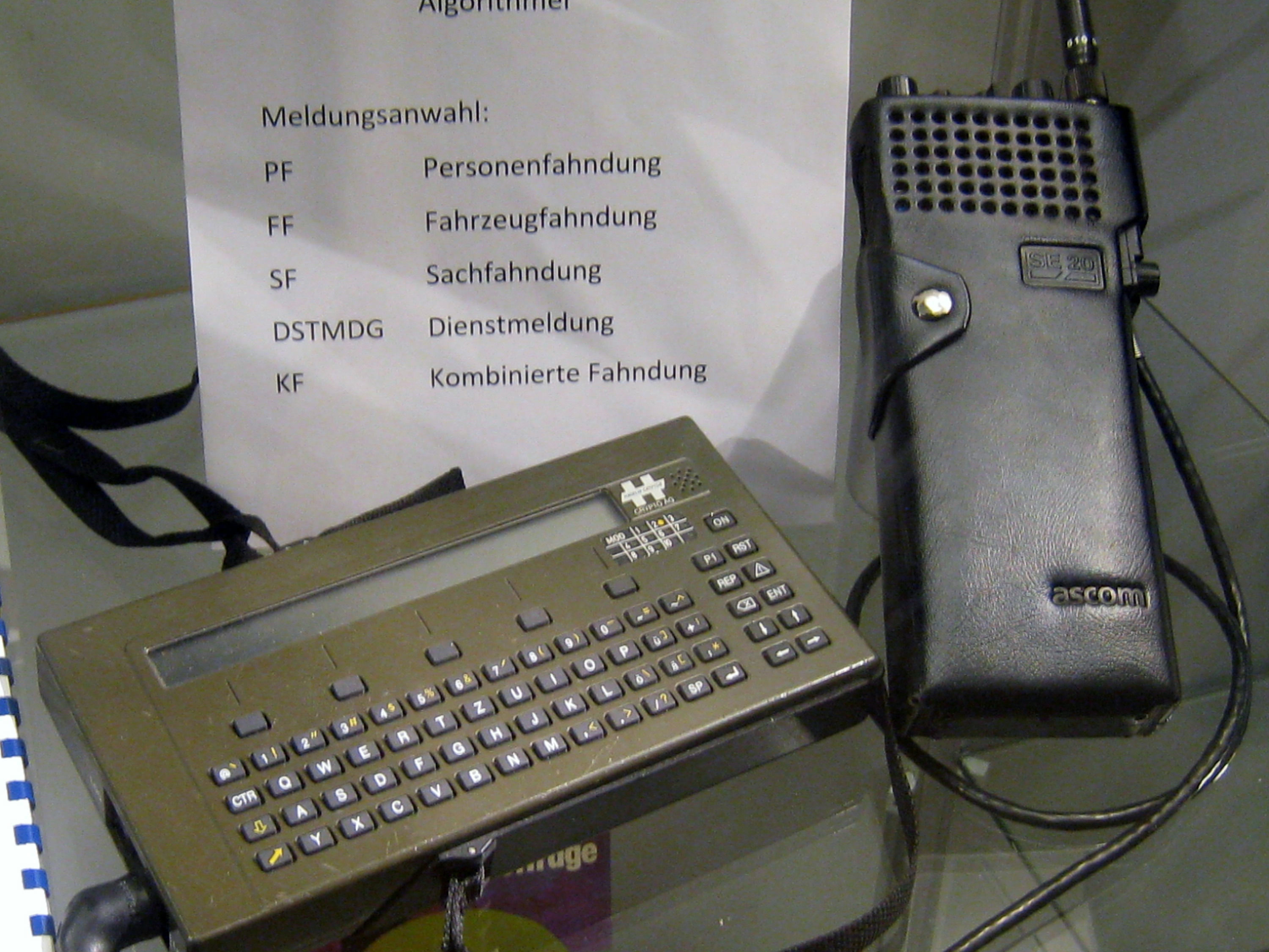 Funkgerät SE-20 (von Autophon) mit HC-5202 (Crypto AG) des Schweizer Grenzwachtkorps im Festungsmuseum Reuenthal